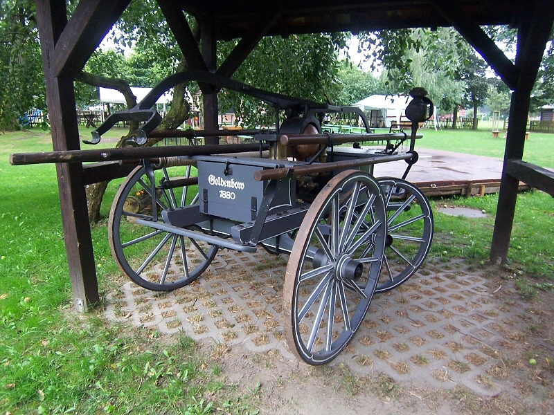 alte Feuerwehrspritze auf dem Pingelhof in Alt Damerow, Kreis Parchim, ältestes Bauerngehöft in Mecklenburg-Vorpommern